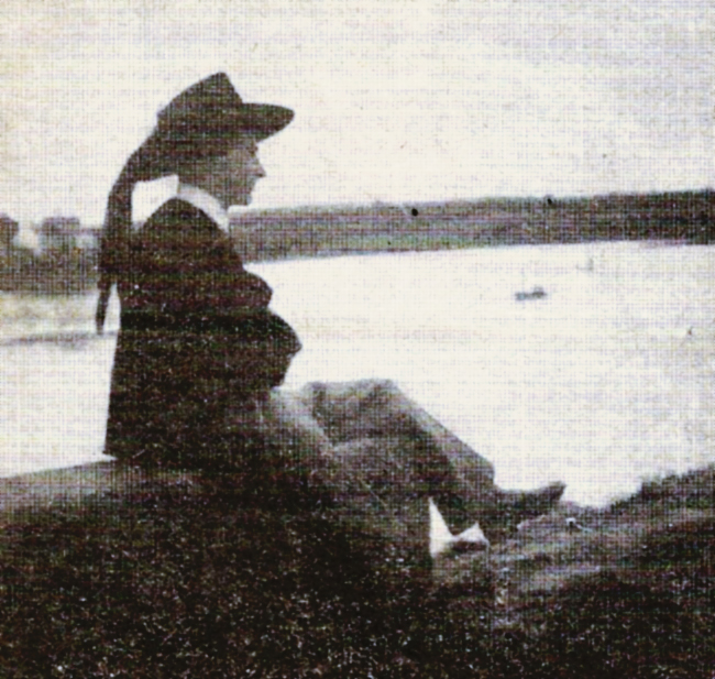 François Abgrall au Huelgoat